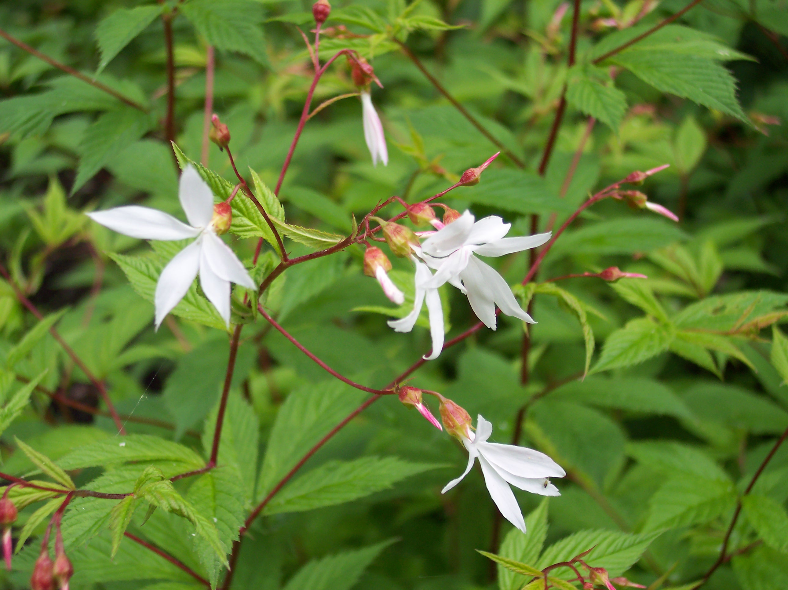 Gillenia trifoliata. Real Jardín Botánico, Madrid